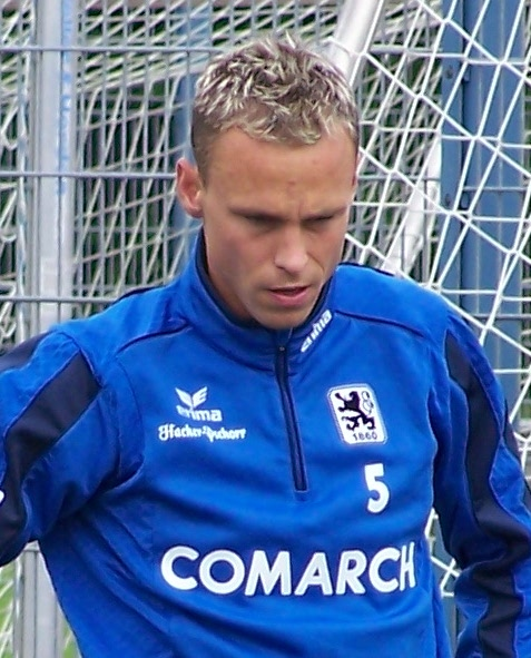 Dennis Malura, 1860 München, Training Grünwalder Straße